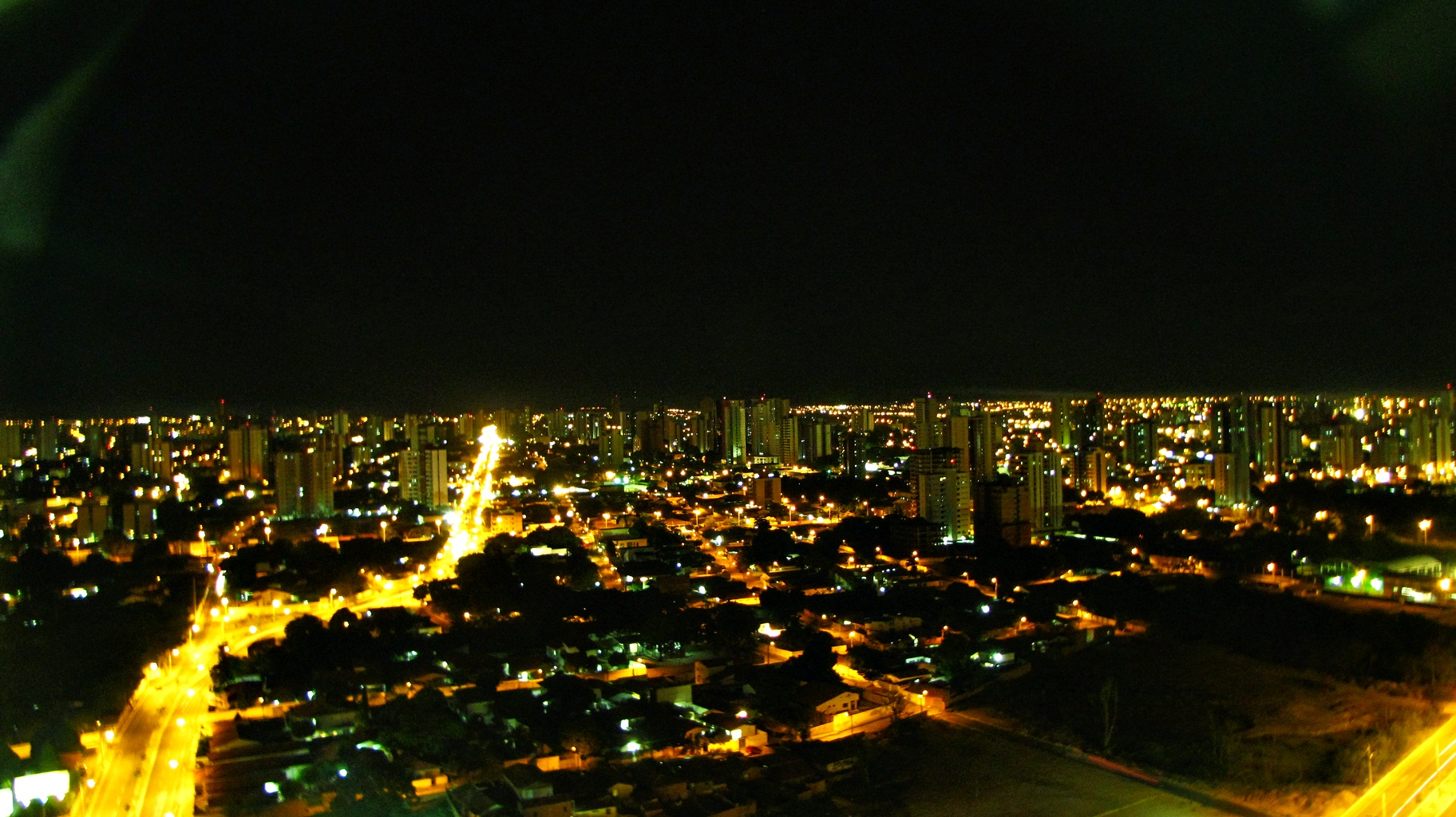 Teresina, no estado do Piauí, Brasil.